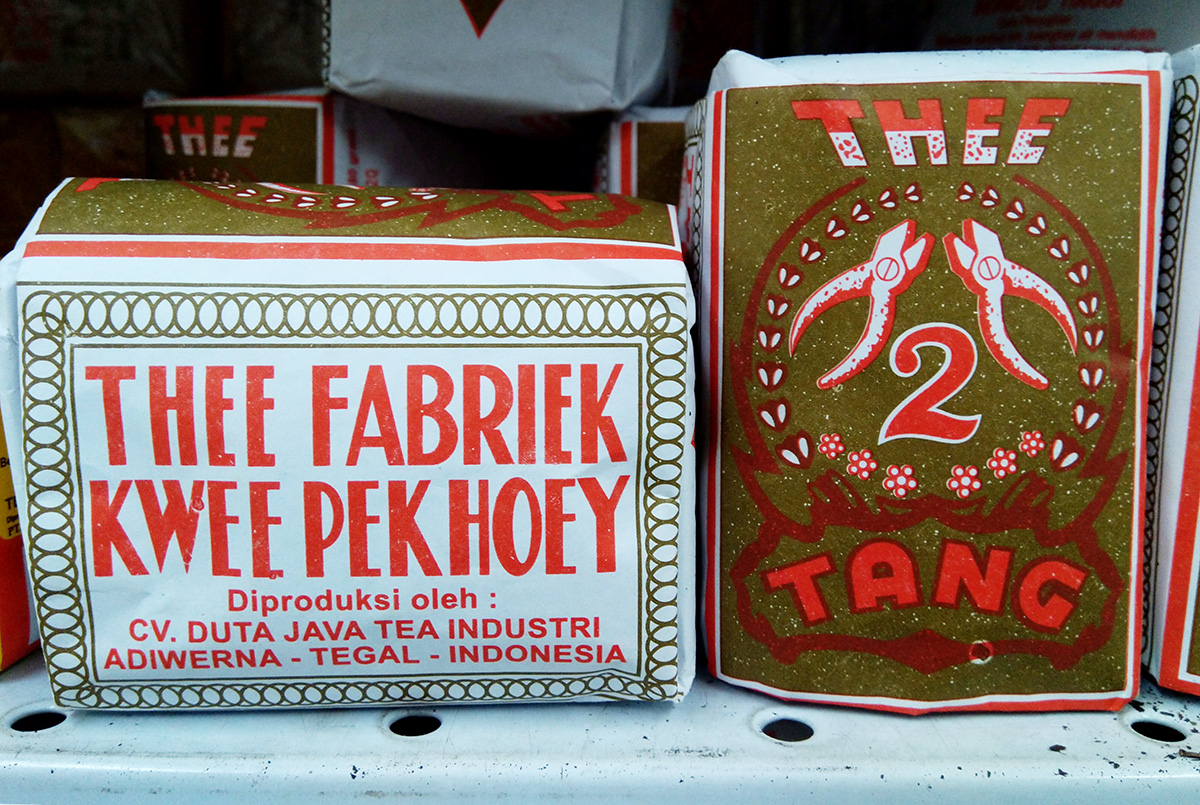 Kemasan teh berbahasa Belanda di Indonesia